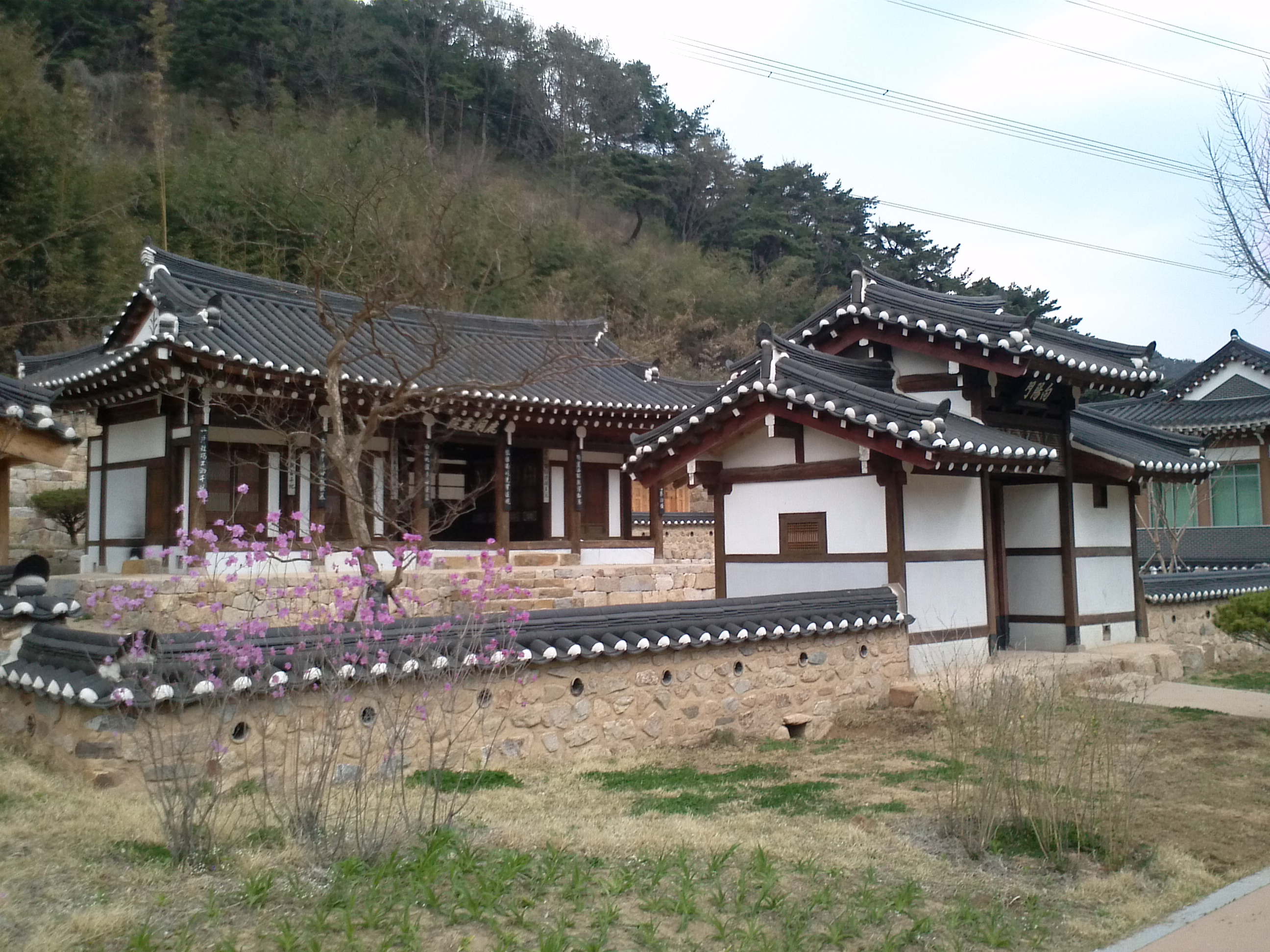 녹동서원 충절관 앞에서 바라본 본관